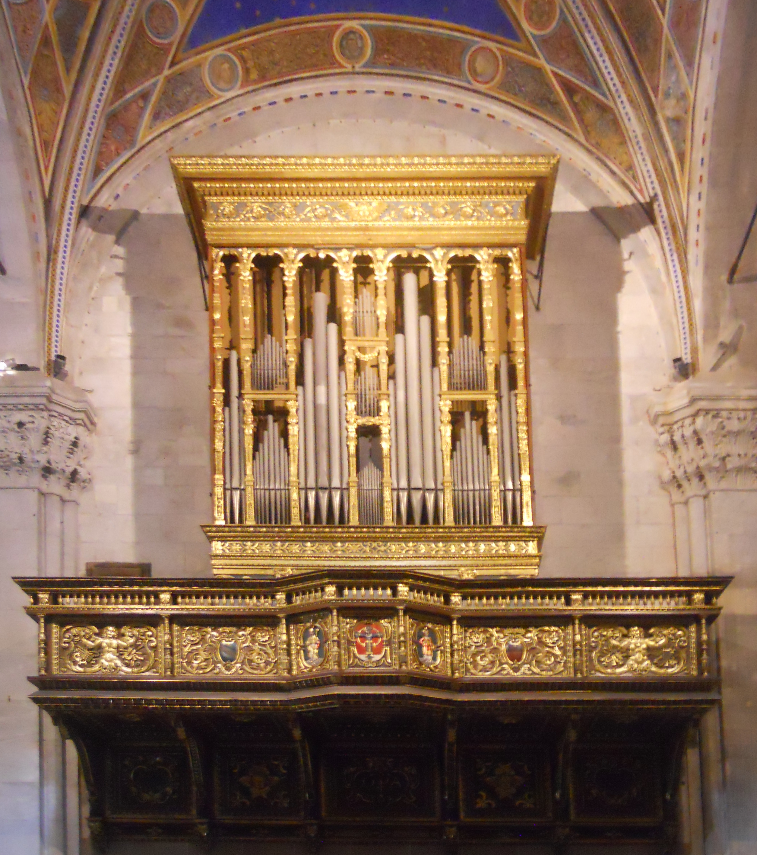 La cassa di sinistra dell'organo Mascioni opus 775 (III+P/48) della cattedrale di San Martino a Lucca.